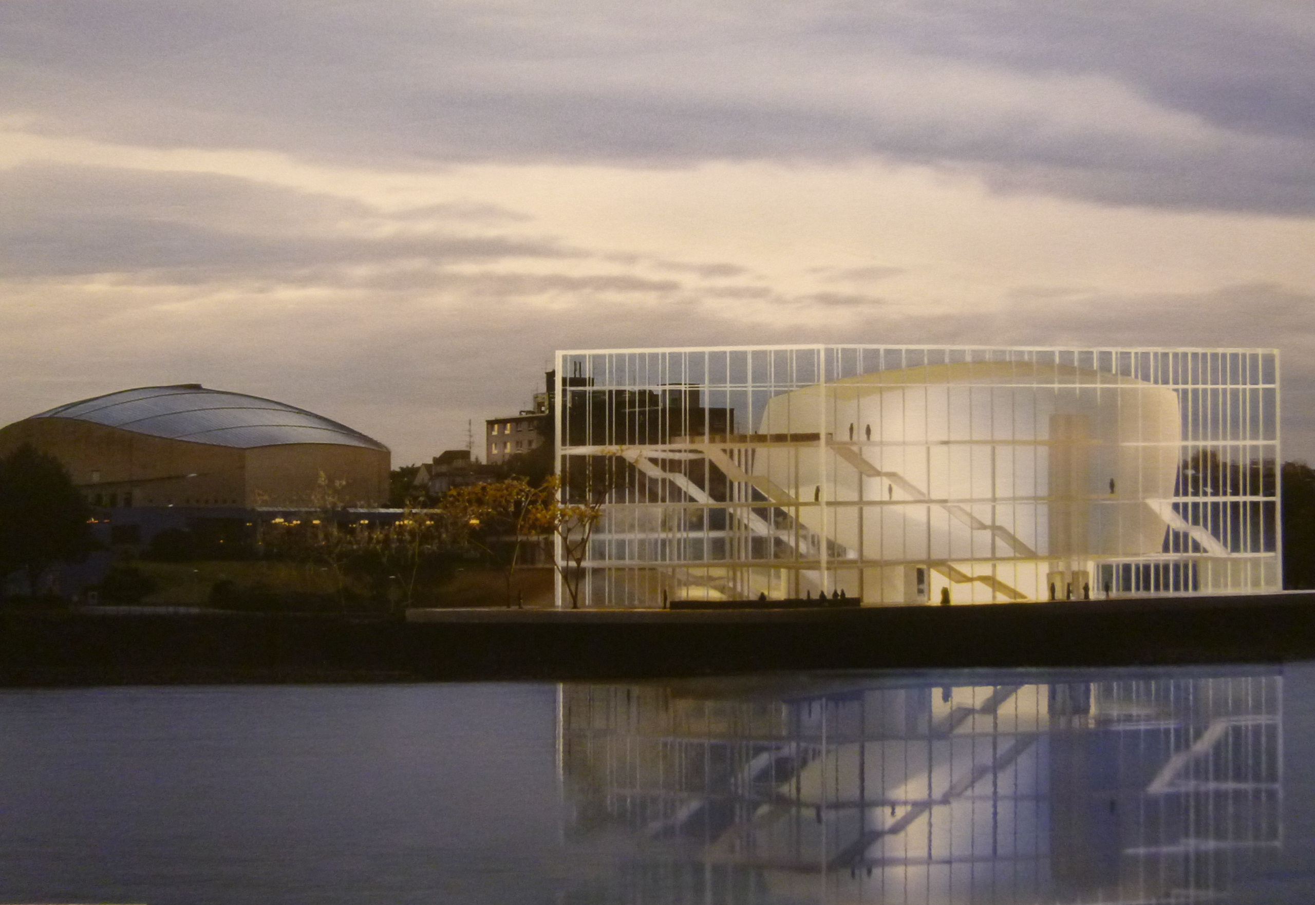 Entwurf für ein Festspielhaus Beethoven in Bonn von Karl-Heinz Schommer